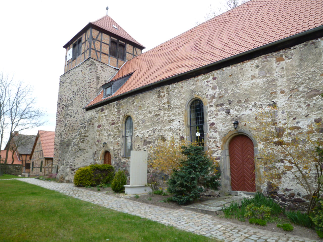 Calvörde-Wegenstedt, Ortskirche